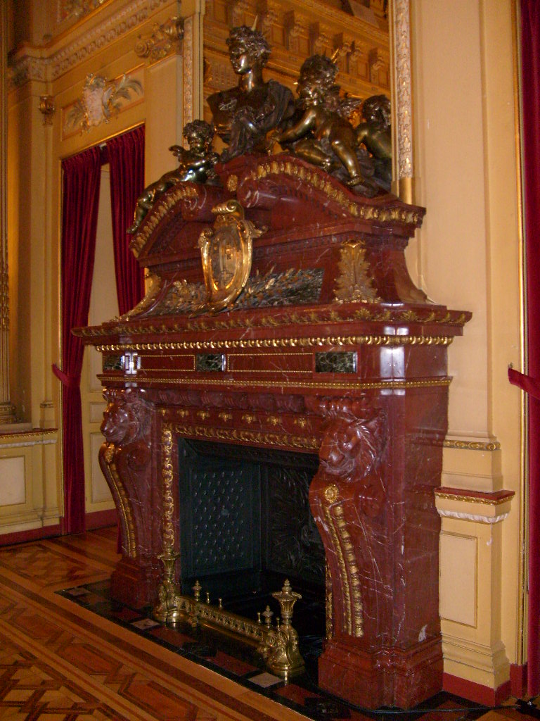 Cheminée du grand foyer du Grand Théâtre de Genève